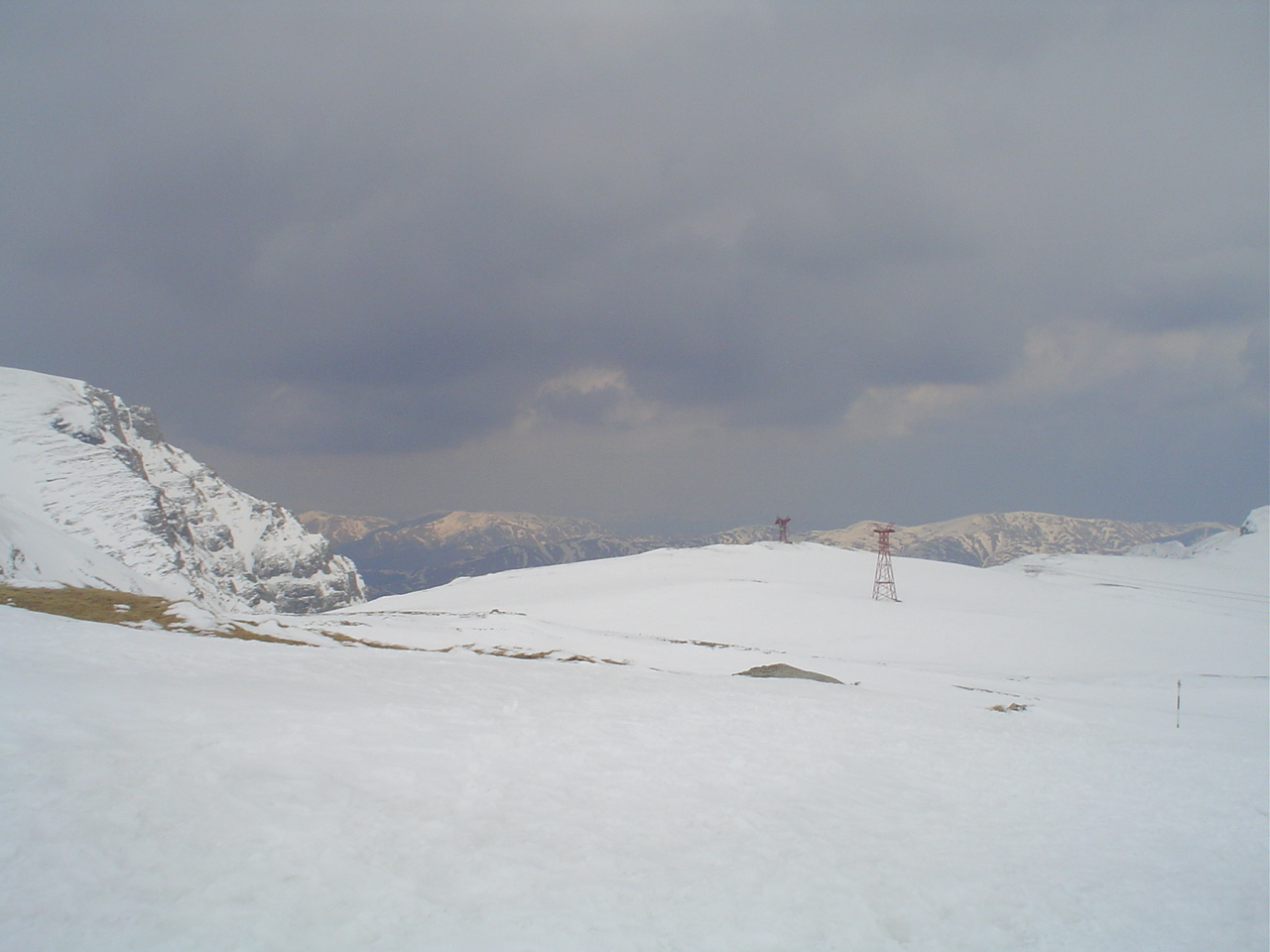 Vedere panoramica - Bucegi